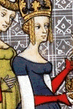 Richilda